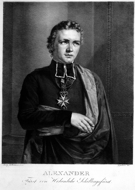 Der Bischof, Abt, Fürst, Wunderheiler Alexander zu Hohenlohe-Waldenburg-Schillingsfürst (1794-1849)